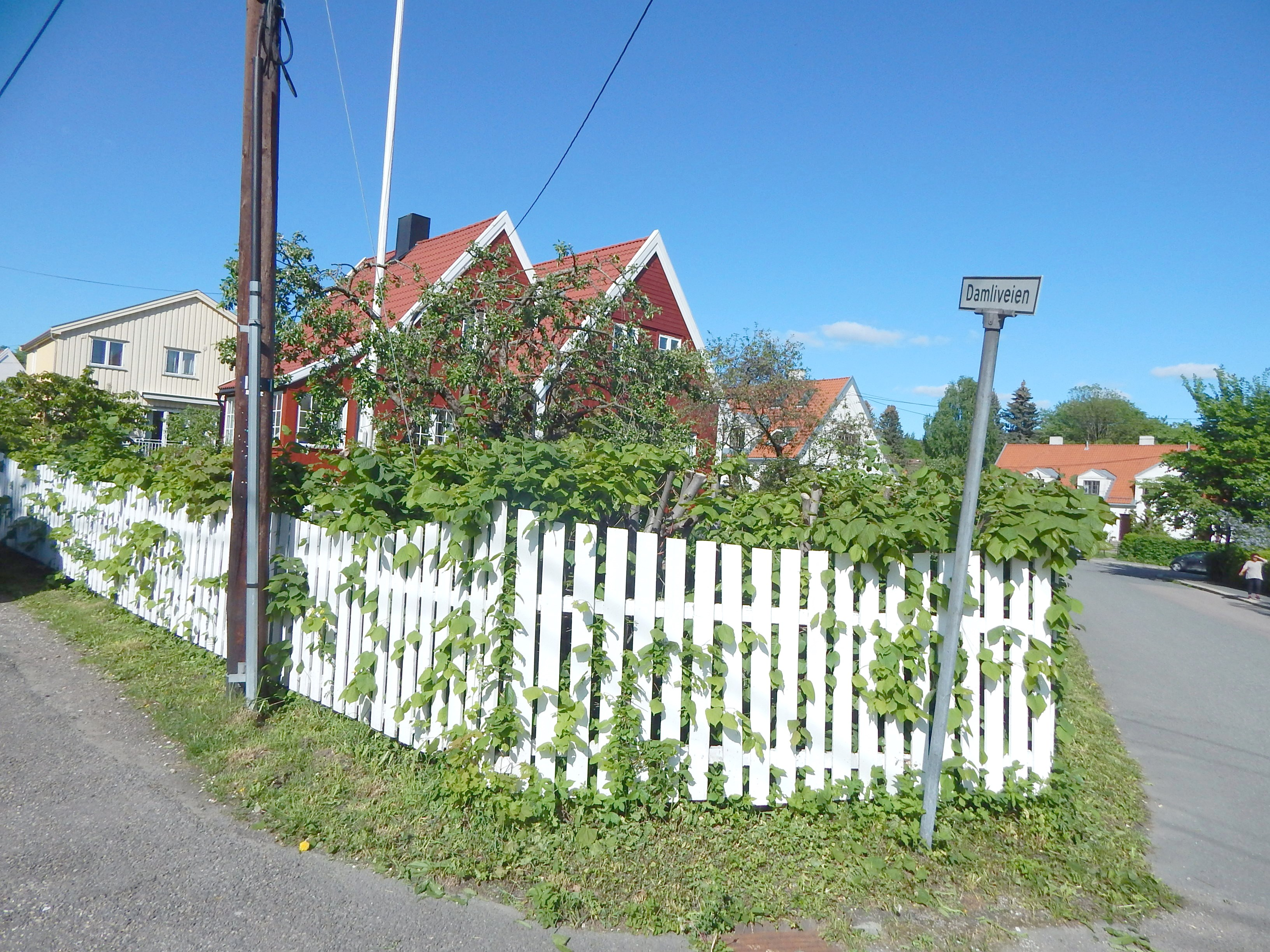 Krysset mellom Damliveien (t.v.) og Engrebrets vei